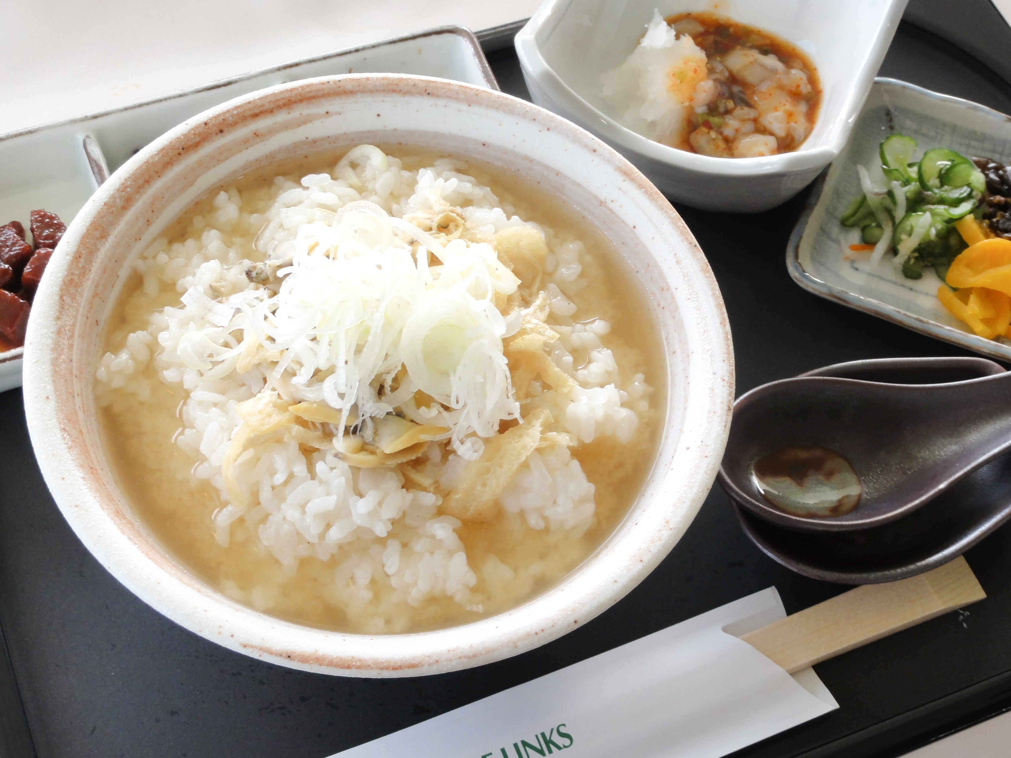 Wakasu Golf Links, Tokyo